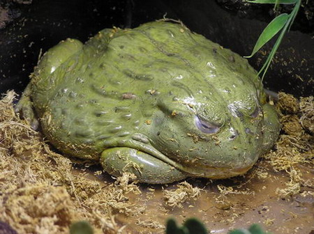 African Bullfrog (Pyxicephalus adspersus) / Afrykańska żaba byk (żaba rycząca)